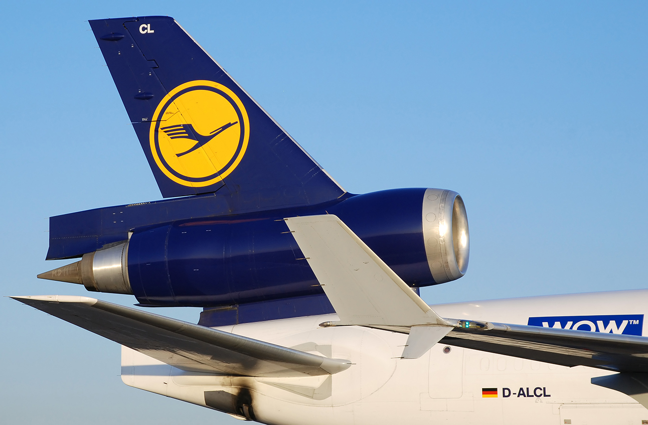 D-ALCL